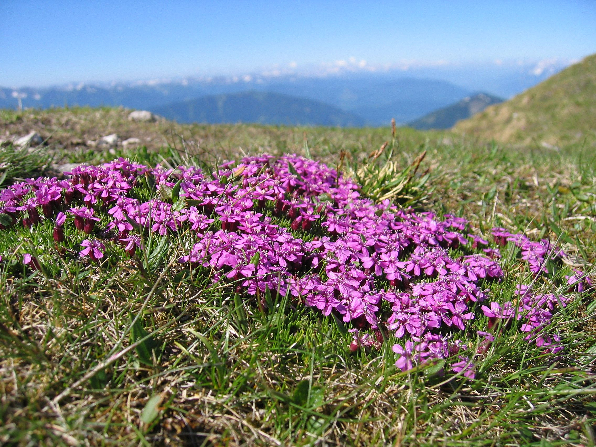 Silene acaulis subsp. aucaulis in Grabnerstein, Styria, Austria